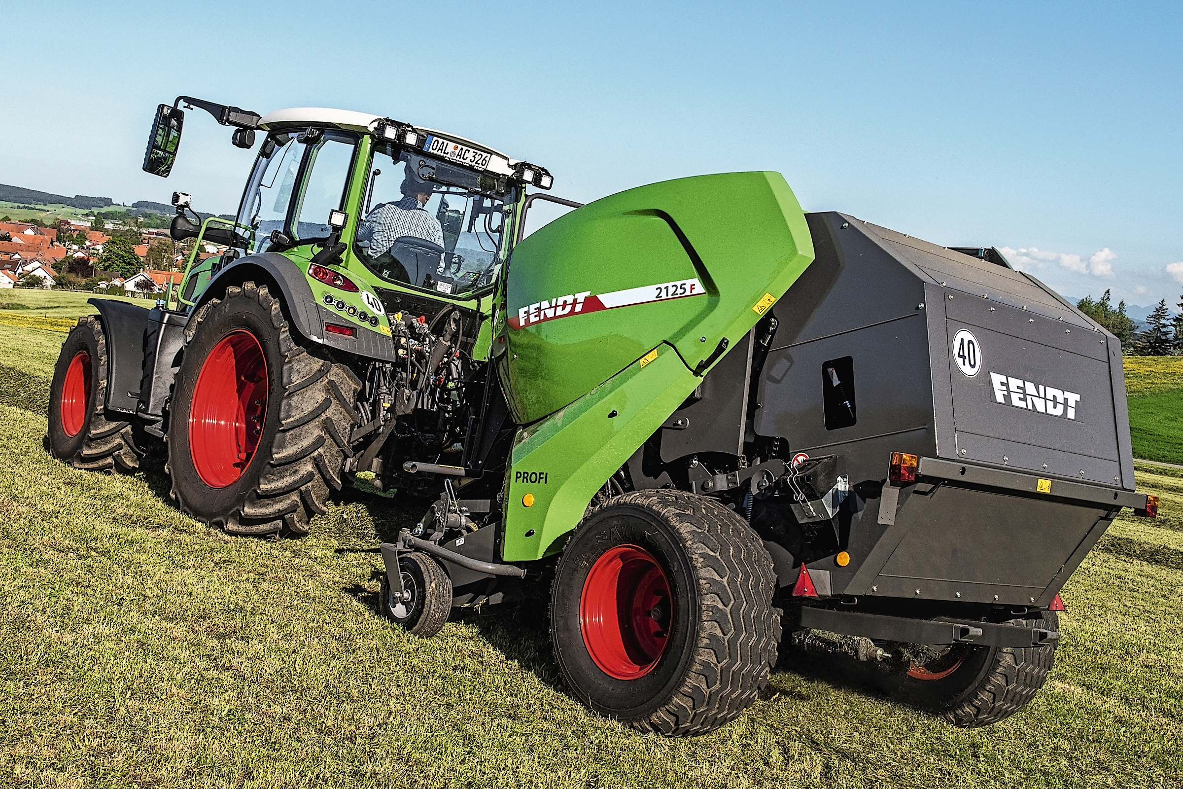 Fendt Festkammer Rundballenpresse 2125 F Profi